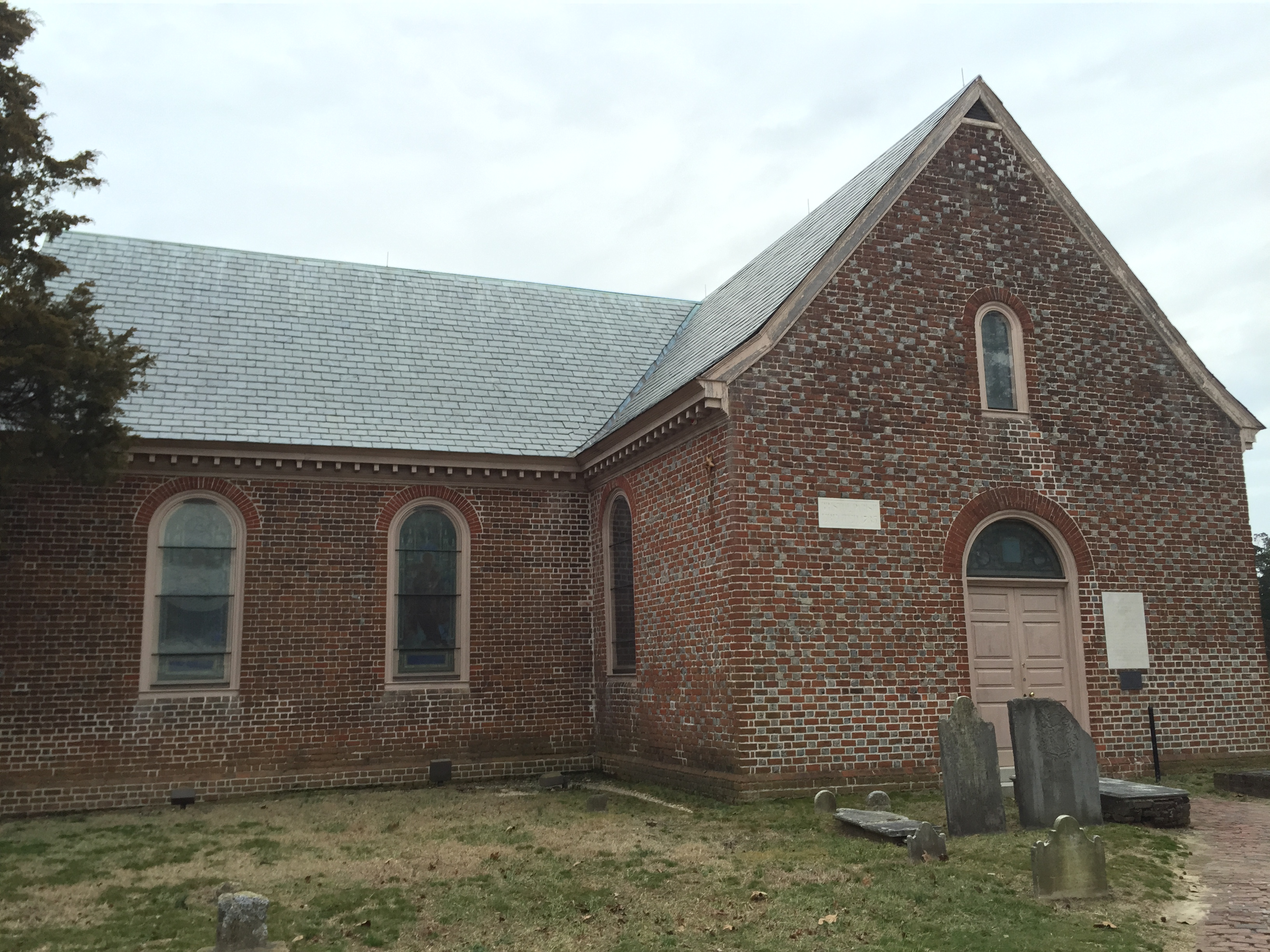 Old Blandford Church Petersburg Virginia